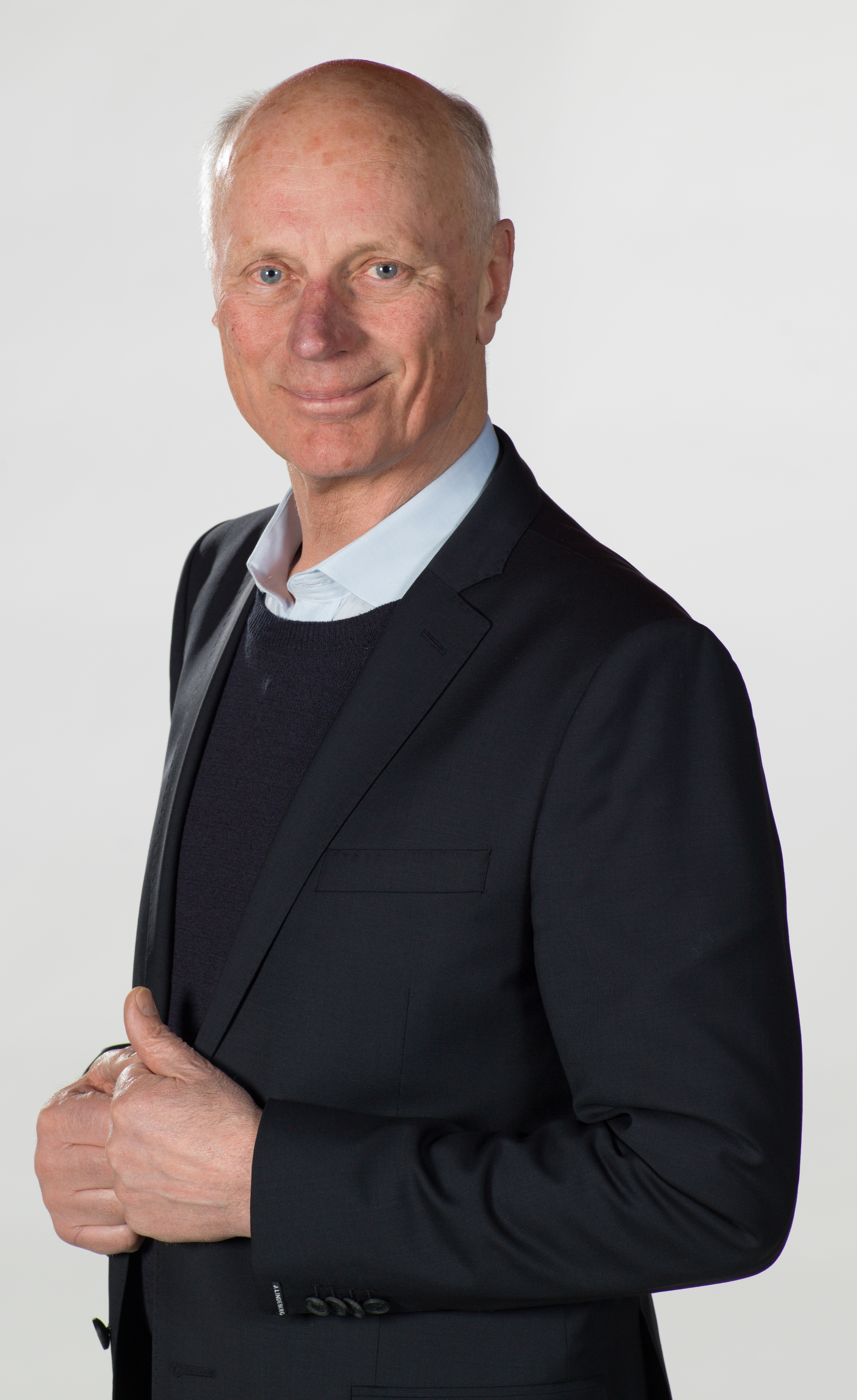 Travkusken Stig H. Johansson.